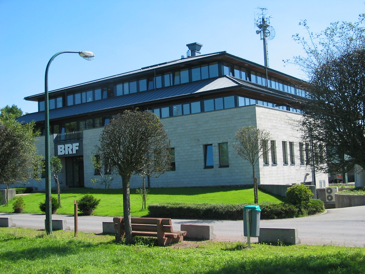 Funkhaus des Belgischen Rundfunks am Kehrweg in Eupen